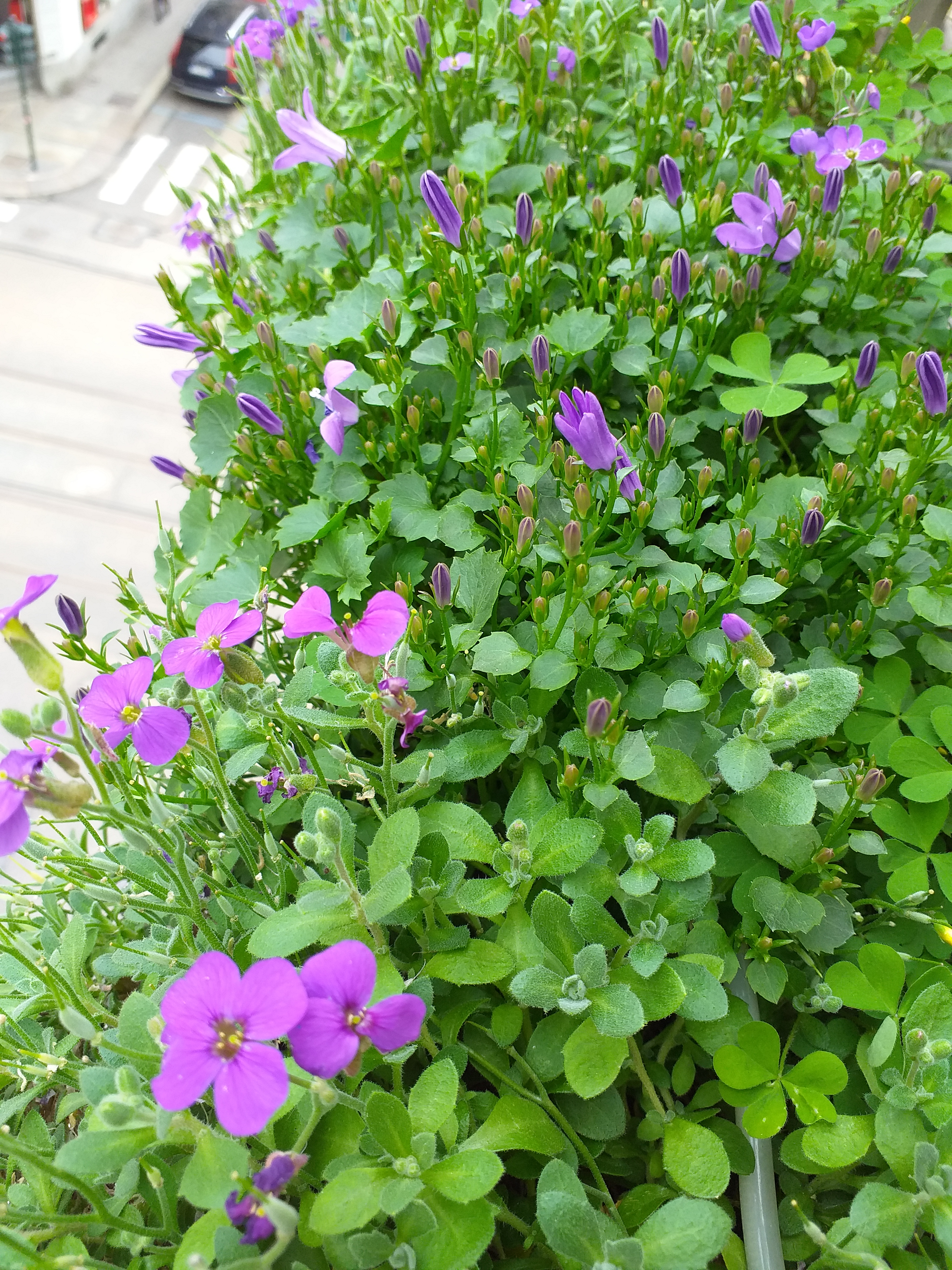 Aubrieta in fiore coltivata in vaso, 2020